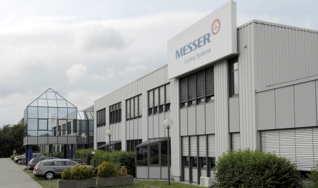 Produktionshallen der Messer Cutting Systems GmbH